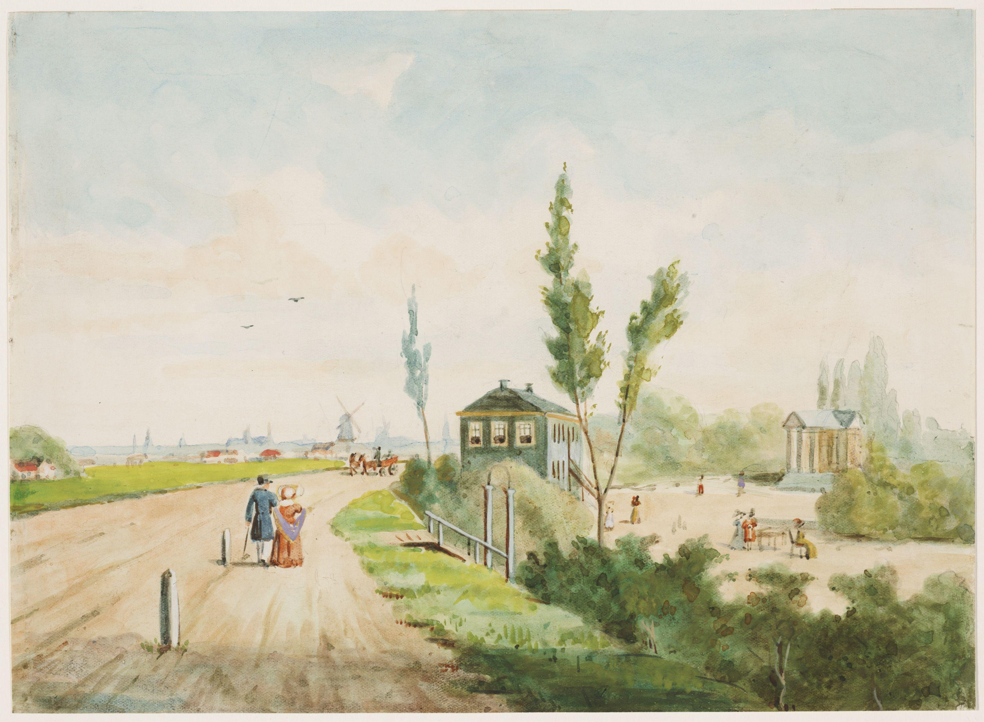 Beschrijving Spaarndammerdijk Rechts: De tuin "Land- en IJ-zicht". Documenttype tekening Vervaardiger Onbekend Anoniem Collectie Collectie Koninklijk Oudheidkundig Genootschap Datering 1825 Geografische naam Spaarndammerdijk Inventarissen Afbeeldingsbestand KOG-AA-2-29-701